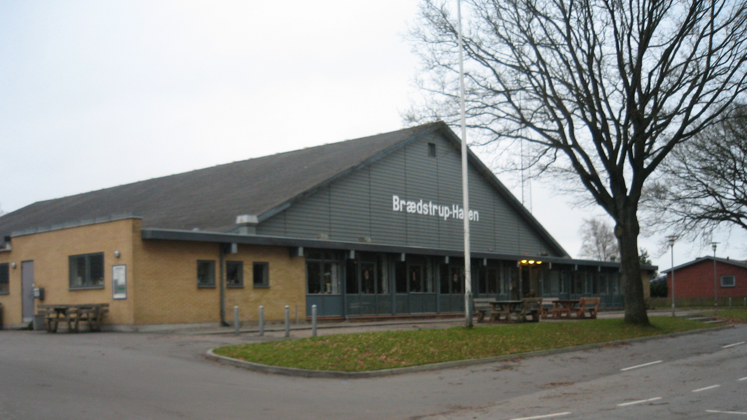 Brædstrup Hallen, Skovvejen, 8740 Brædstrup